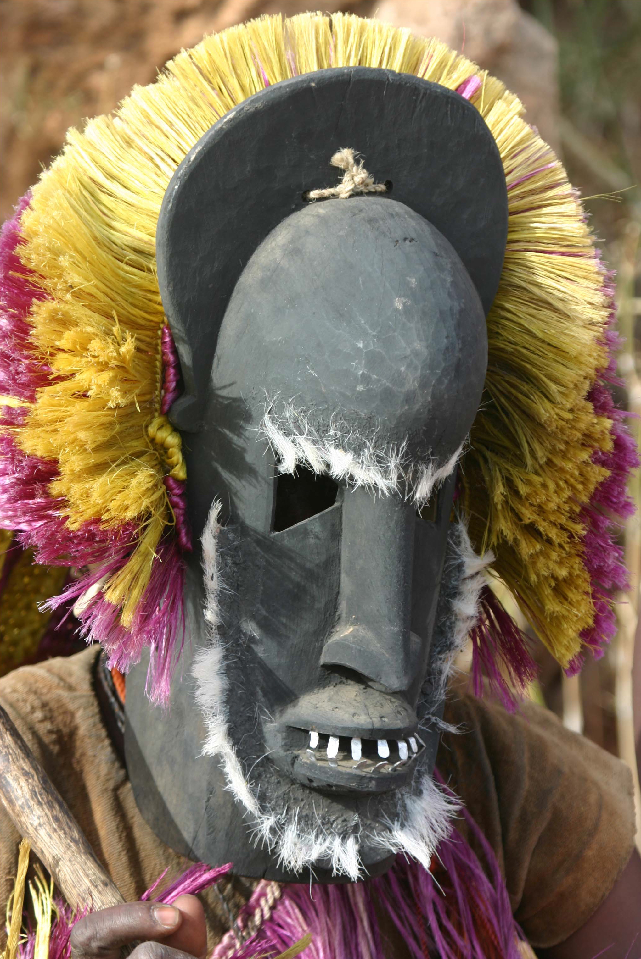 Traditional dogon masques in Tirelli, Pays Dogon, Mali.